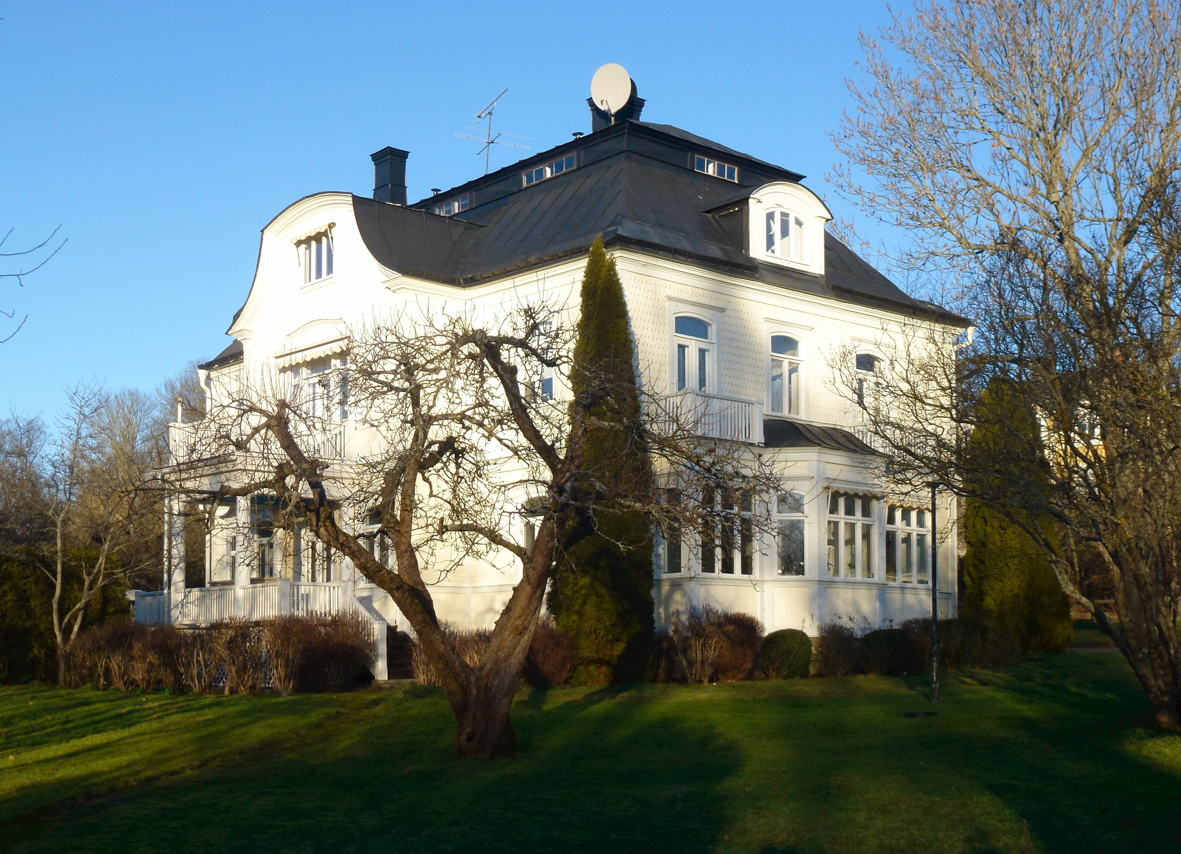 Den så kallade Prinsvillan vid Germaniavägen 14, Djursholm